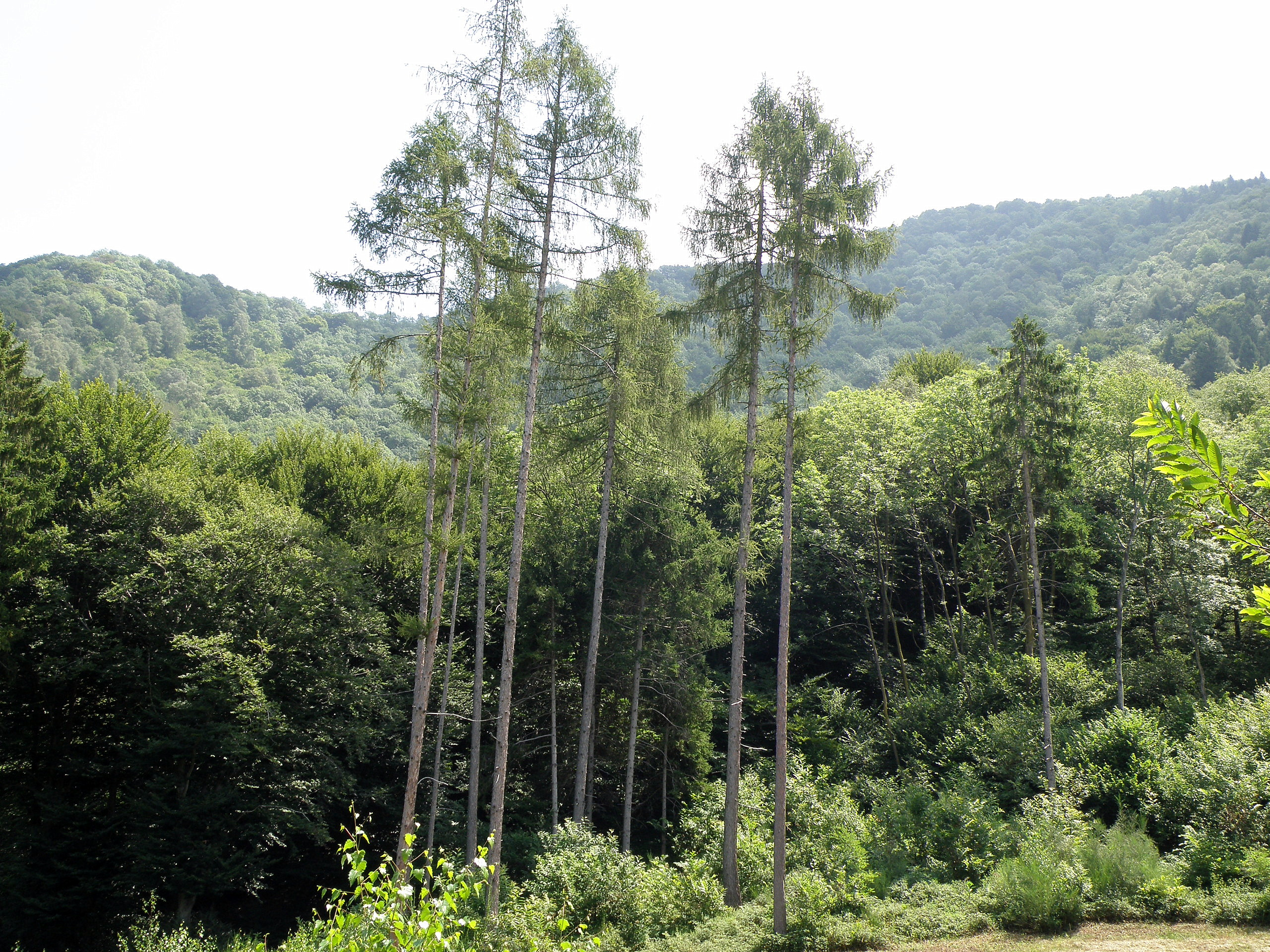 Campo dei Fiori (VA),Pian delle Noci.